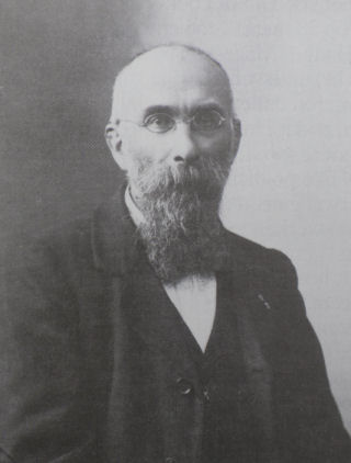 AJ Servaas van Rooijen (1839-1925). Foto van foto gepubliceerd in Jaarboek Die Haghe, 1990.